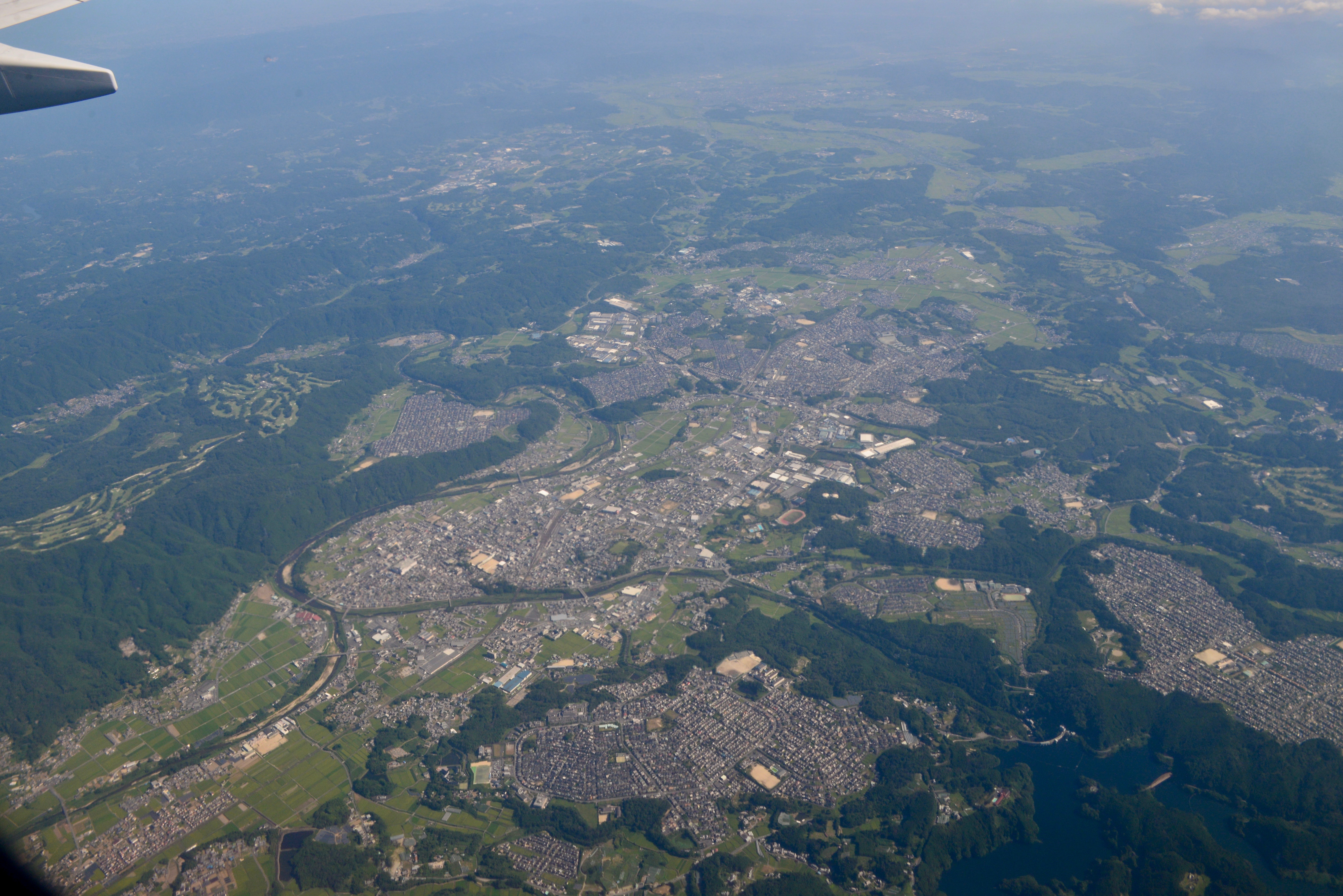 三重県名張市上空